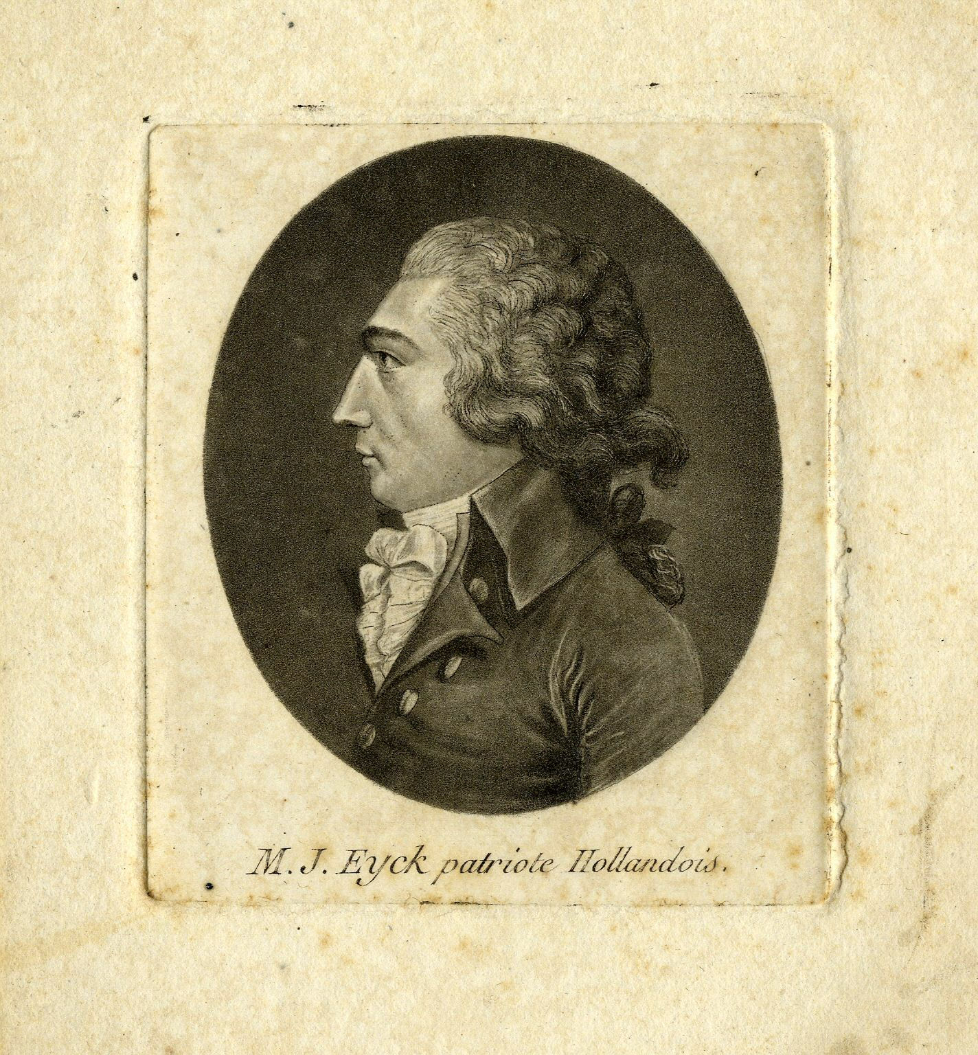 Portret van Maurits Jacob Eyck, geboren 1764, lid van het provinciaal bestuur van Utrecht , raadsheer aan het Hof van Justitie te Utrecht (1796-?), afgevaardigde ter Statenvergadering, lid van het stedelijk bestuur van Utrecht (1803-?), wethouder en adjunct-maire te Utrecht, burgemeester van Maartensdijk, overleden 1853. Borstbeeld links in profiel, in ovaal.